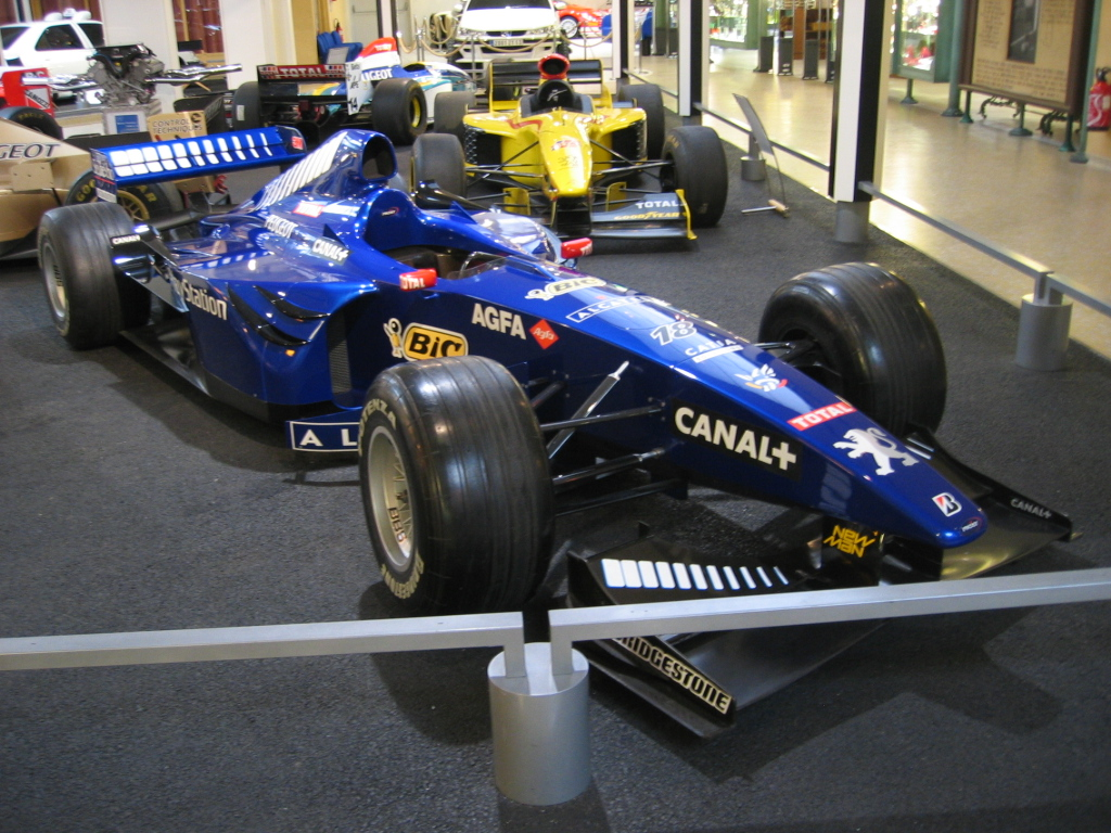 Formule 1 Prost Grand Prix - Musée Peugeot Sochaux